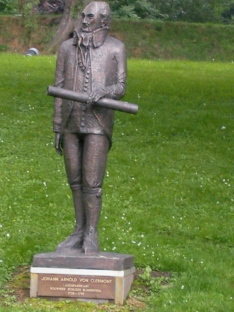 Skulptur